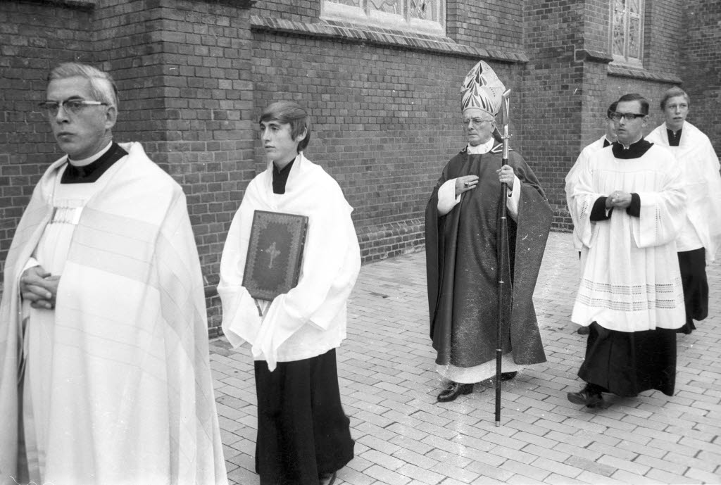 vor der Nikolauskirche in der Rathausstraße nach einem Firmungsgottesdienst. Vorn Landesdechant Josef von de Berg.